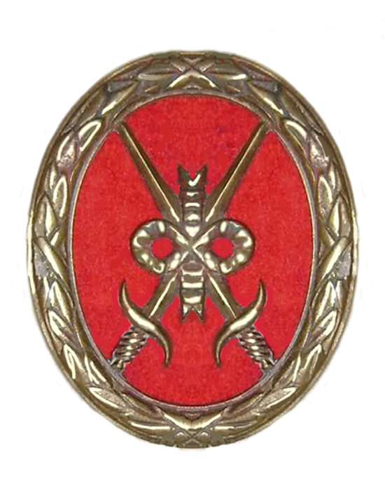 Medaille de deux épées